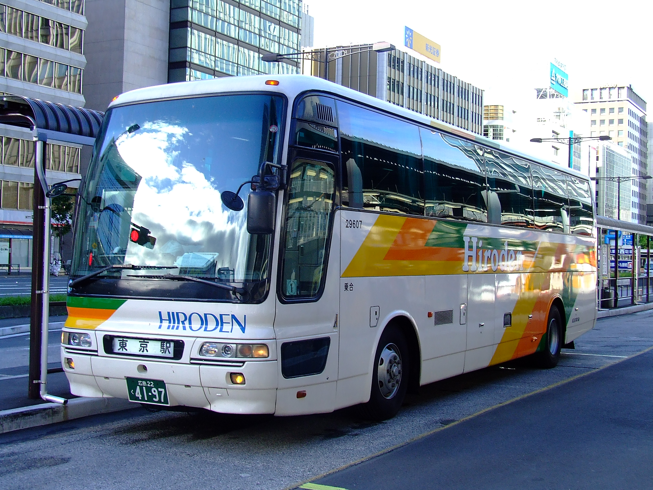 広島電鉄の夜行高速バス「ニューブリーズ号」東京駅にて（ダブルデッカーのエアロキングが使われることが多いが、この日はスーパーハイデッカーのエアロクイーンであった）